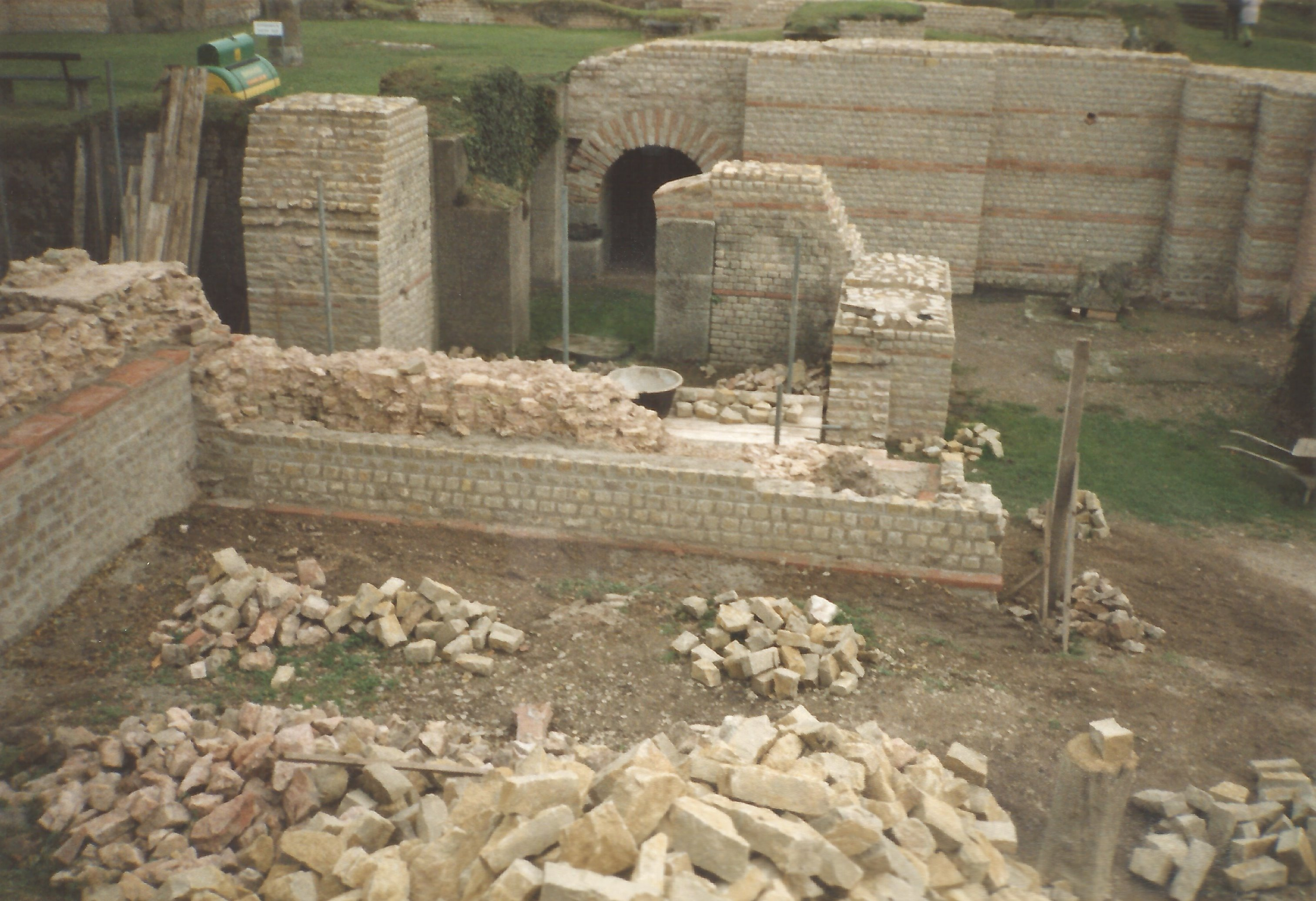 Konservierung und Restaurierung der original römischen Mauerreste im Fundamentbereich. Das Bild zeigt die detailgetreue Rekonstruktionsarbeit der Bauhütte Trier (Landesamt für Denkmalpflege) im Bereich zwischen Sudatorium III´(Sauna) und den Lichthöfen 25´, 26´ in den Jahren 1990-1991. Die Kalksteinverblender wurden dabei einzeln von Hand angefertigt (siehe Bild unten Rechts) und sorgsam in das originale römische Mauerwerk eingepasst.